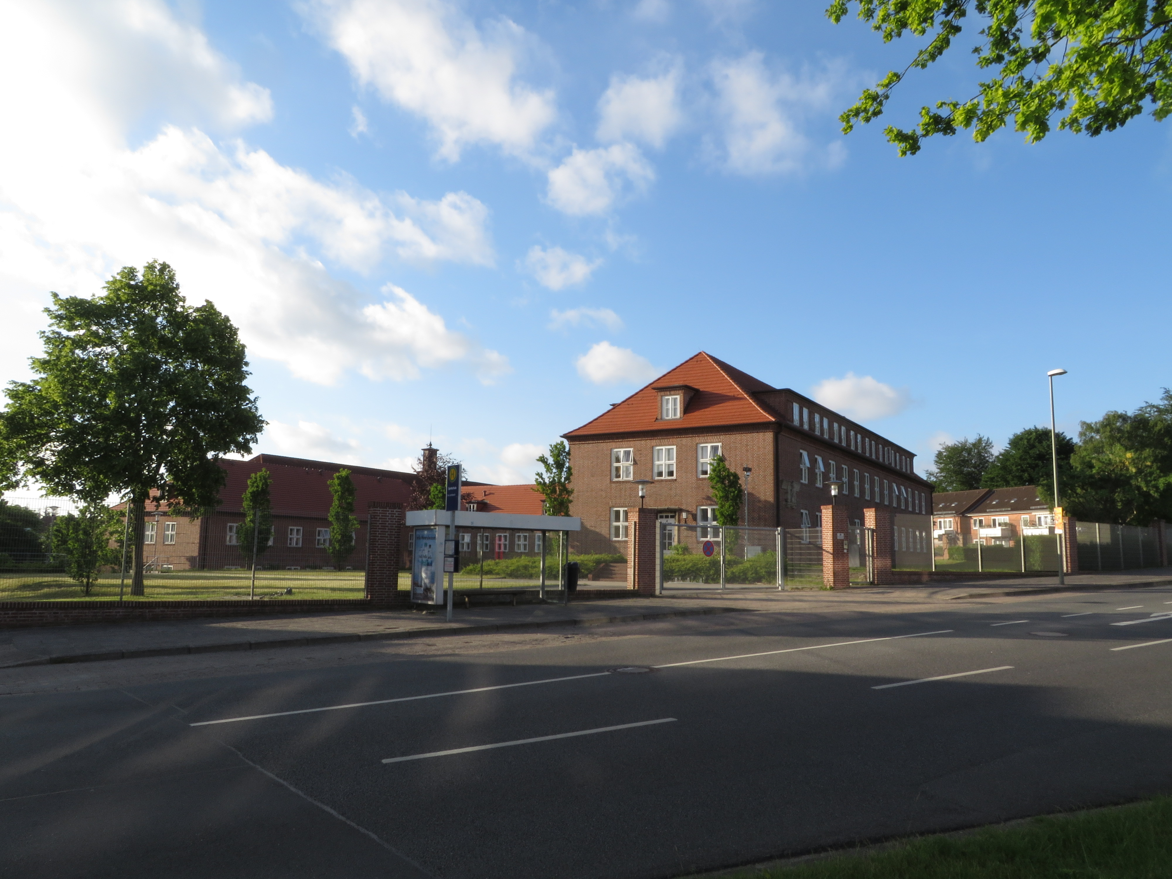 Die Sportschule Flensburg-Mürwik (Mai 2014), Bild 004